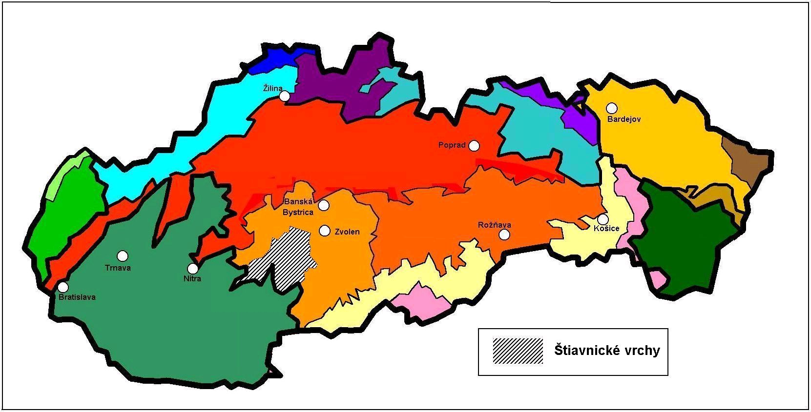 Stiavnicke vrchy